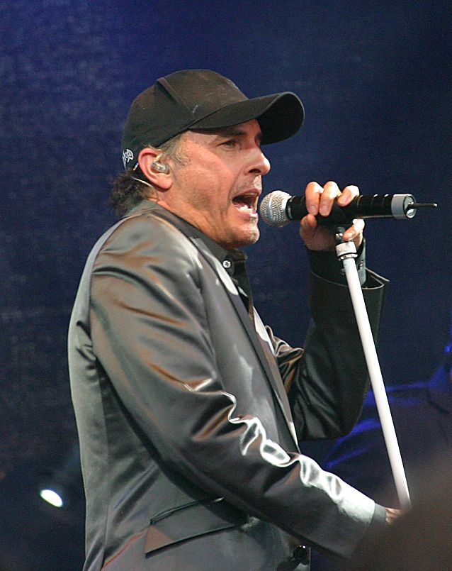 Peter Schilling, Stadtfest Leipzig